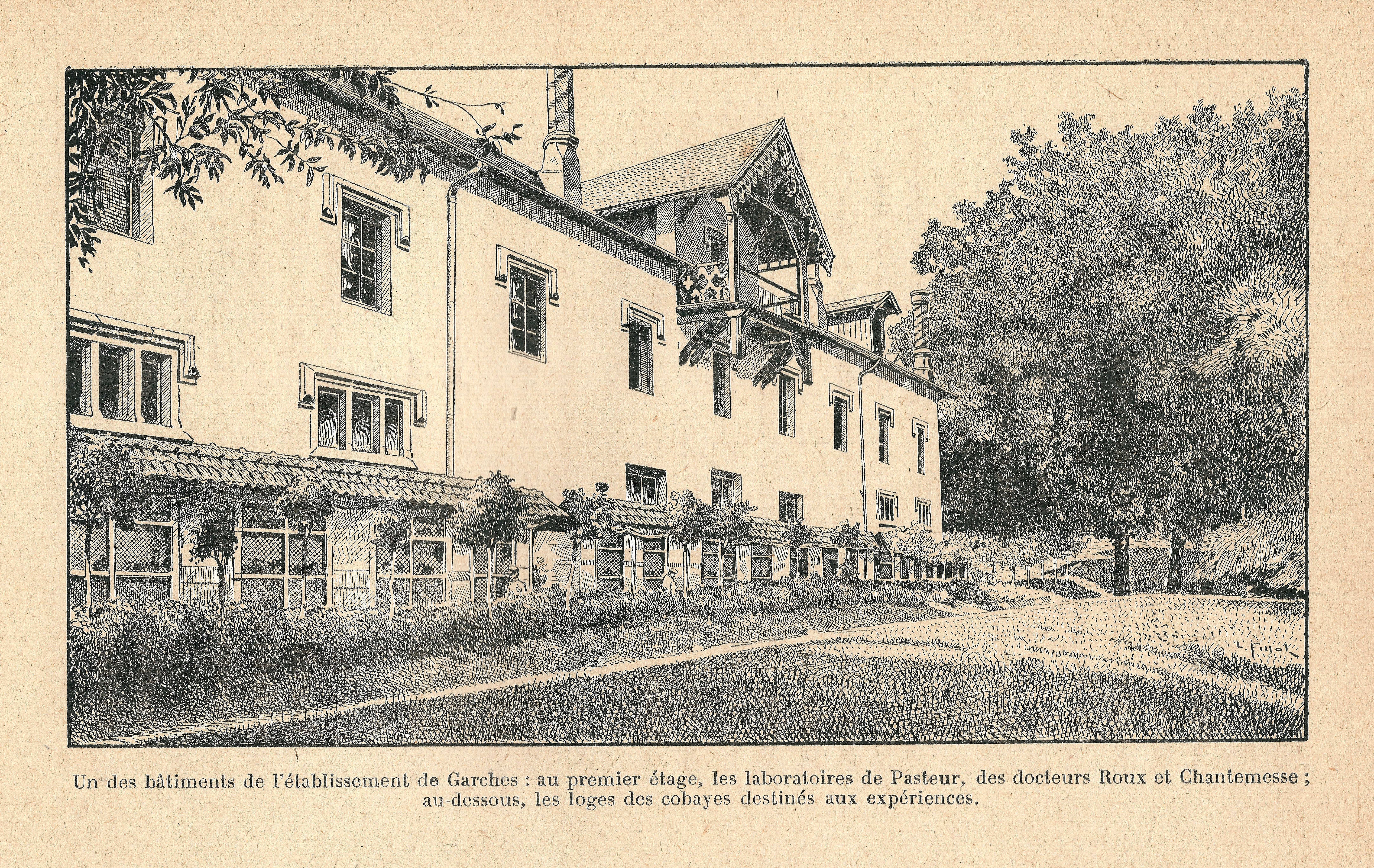 L'institut Pasteur de Paris & ses annexes : dessins vers 1900.